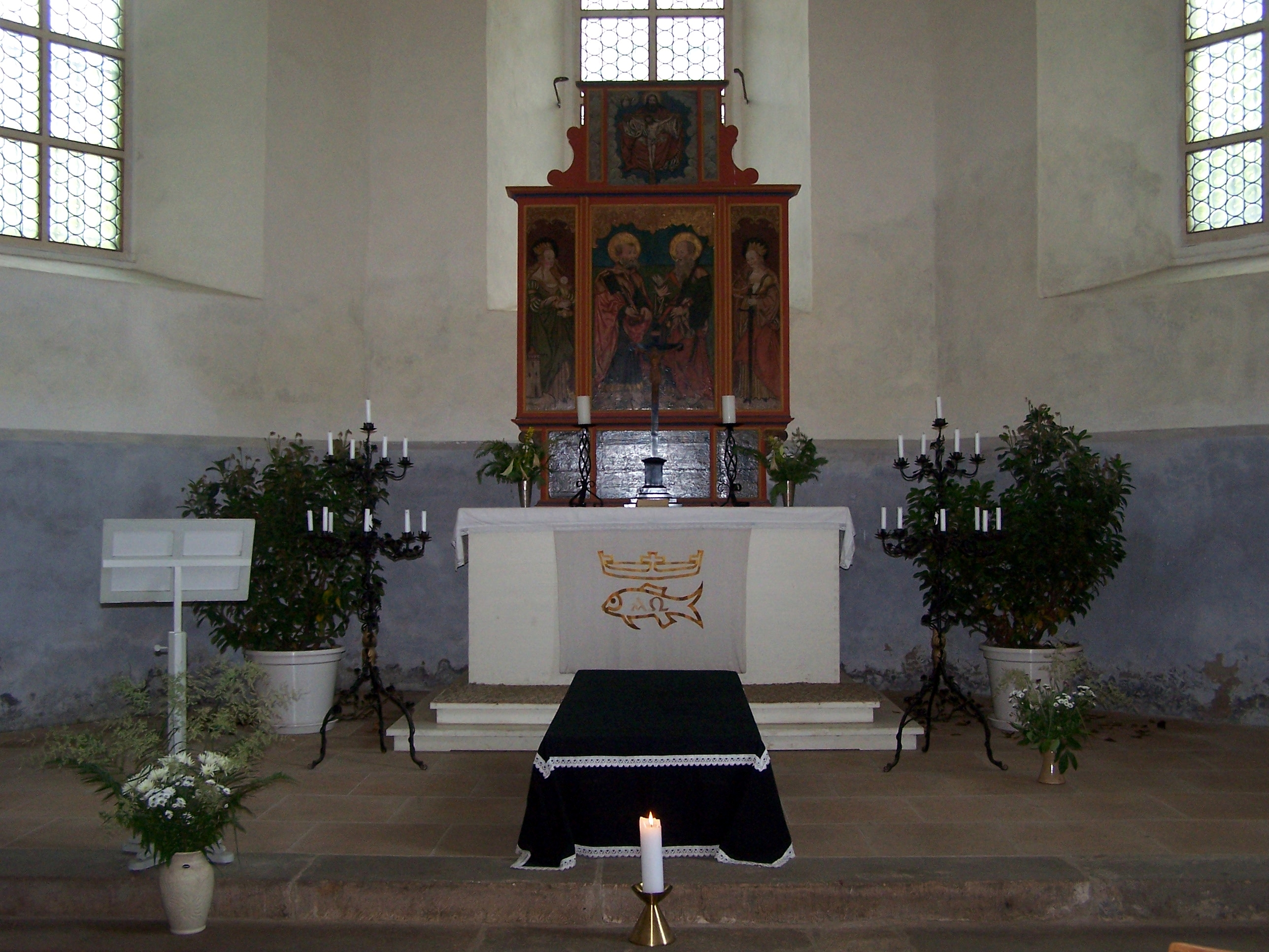 Altarraum der Urbanskirche in Meißen